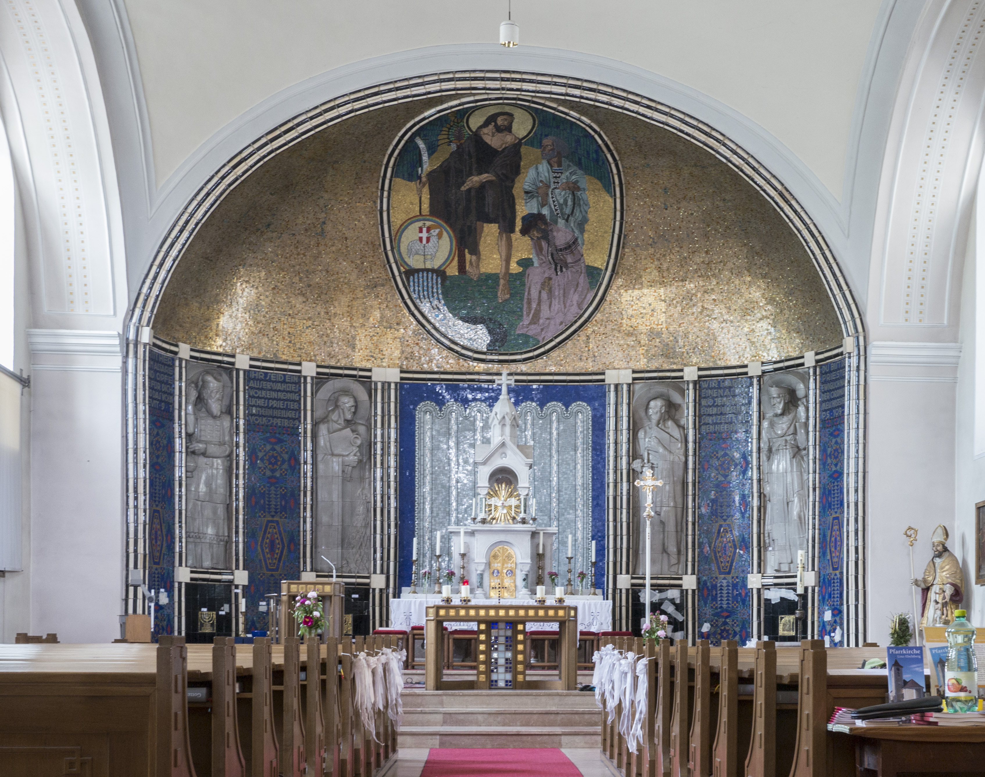 Kath. Pfarrkirche hl. Johannes der Täufer mit Apsis von Leopold Forstner